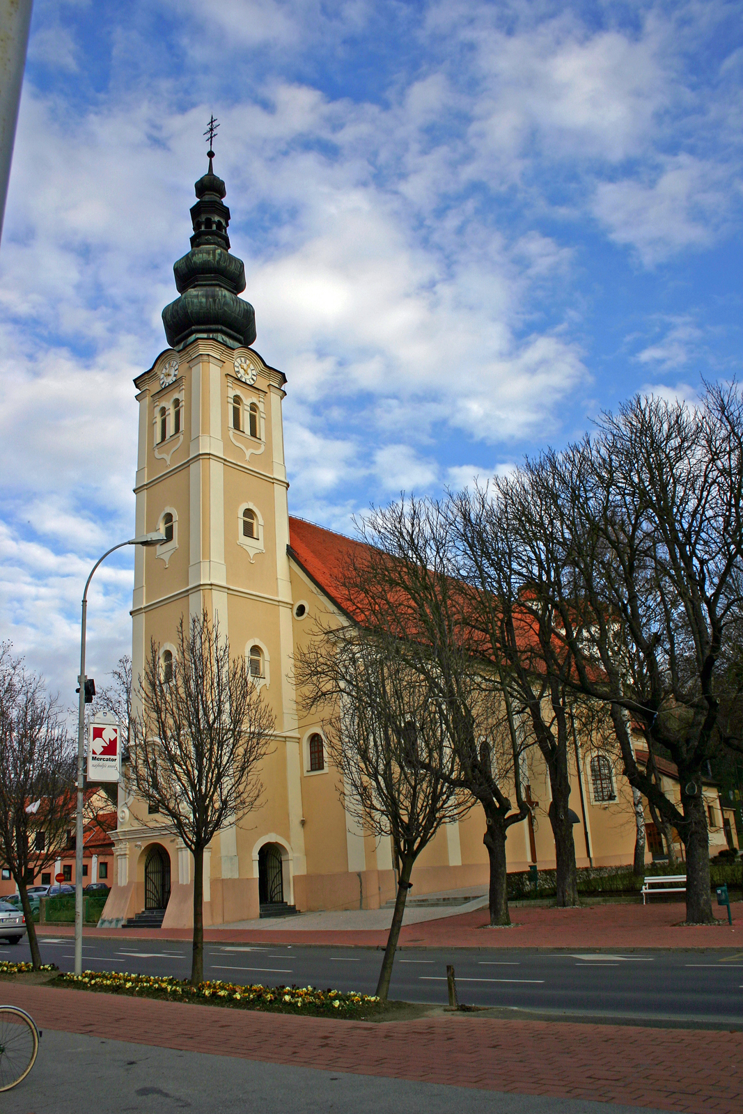 Cerkev svete Katarine, Lendava. St. Catherine church, Lendava. Die Kirche von heilige Katharina, Lendava.